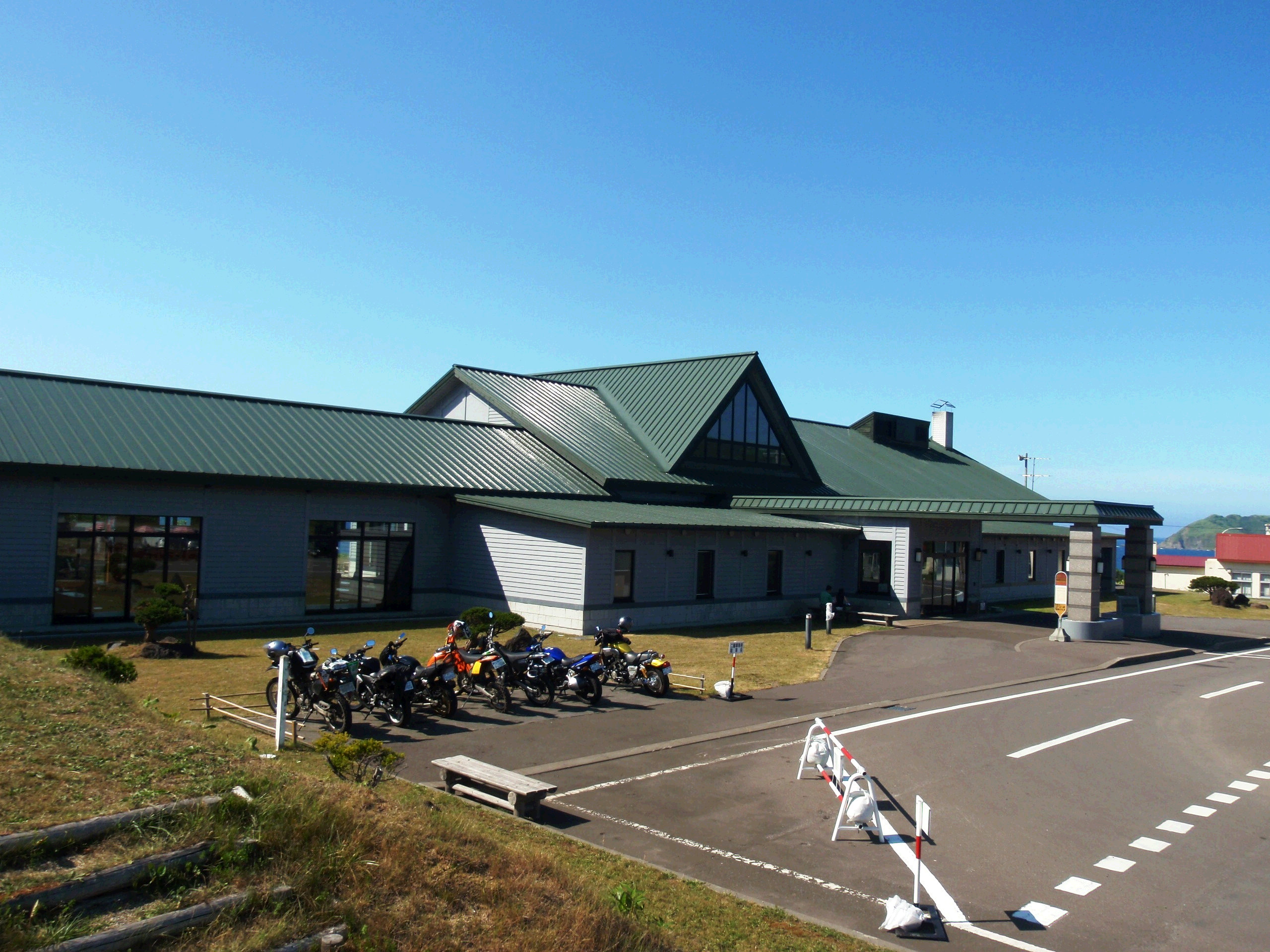 積丹温泉、岬の湯しゃこたん